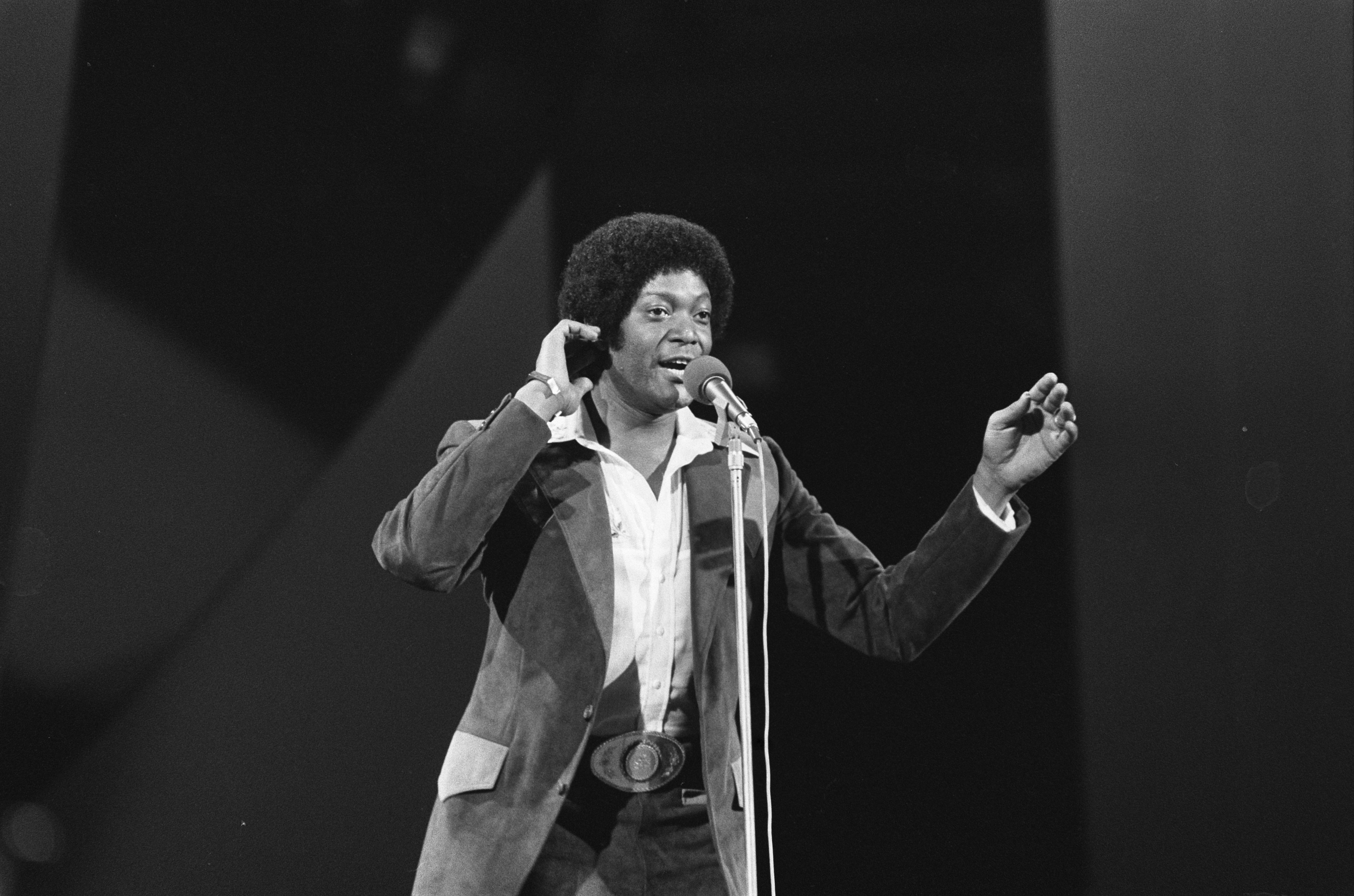 Collectie / Archief : Fotocollectie Anefo Reportage / Serie : Grand Gala du Disque in de RAI Beschrijving : Dobie Gray Datum : 17 februari 1974 Locatie : Amsterdam, Noord-Holland Trefwoorden : festivals, zangers Persoonsnaam : Gray, Dobie Instellingsnaam : RAI Fotograaf : Fotograaf Onbekend / Anefo Auteursrechthebbende : Nationaal Archief Materiaalsoort : Negatief (zwart/wit) Nummer archiefinventaris : bekijk toegang 2.24.01.05 Bestanddeelnummer : 927-0102